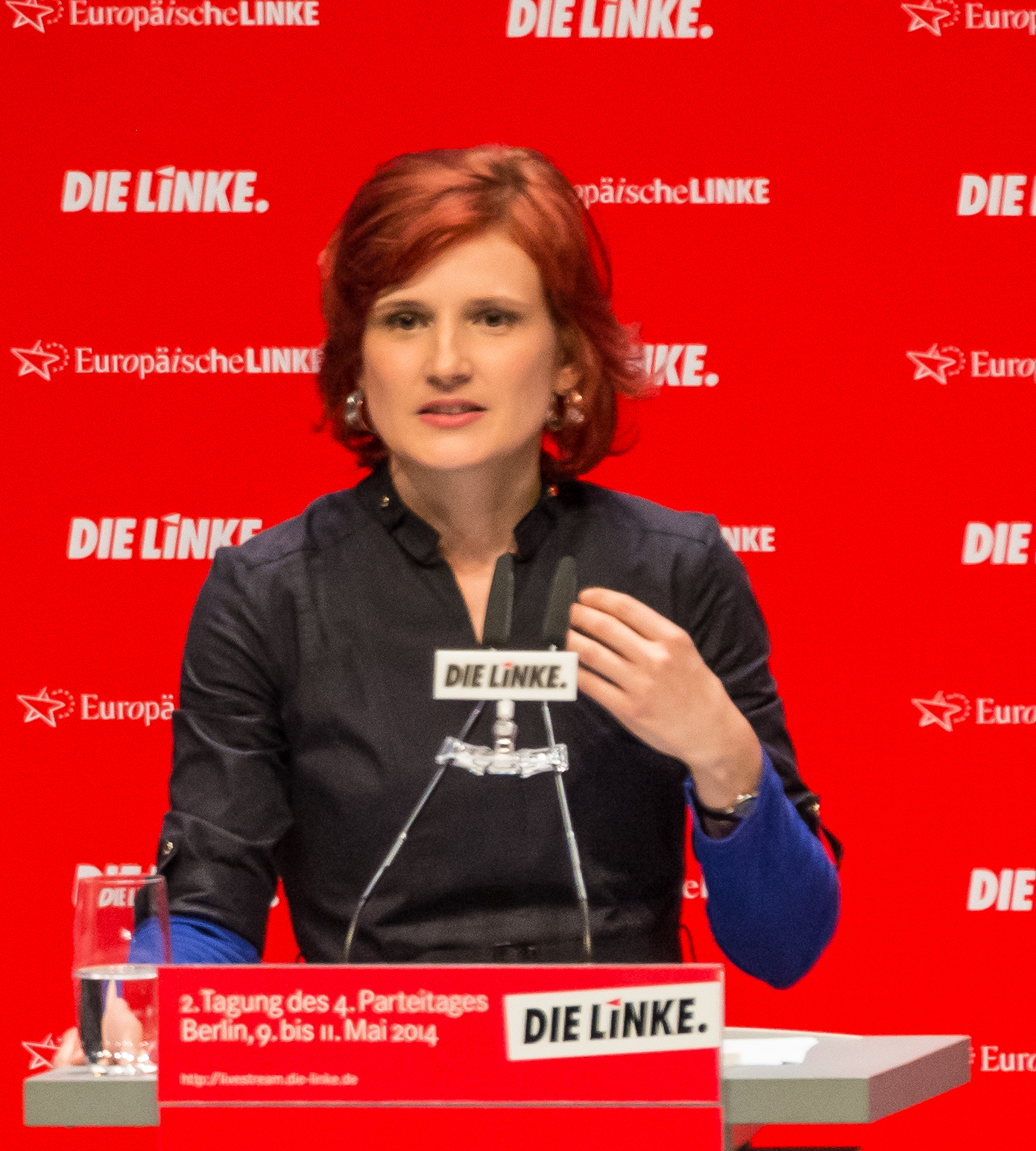 Bundesparteitag DIE LINKE Mai 2014 in Berlin, Velodrom: Katja Kipping